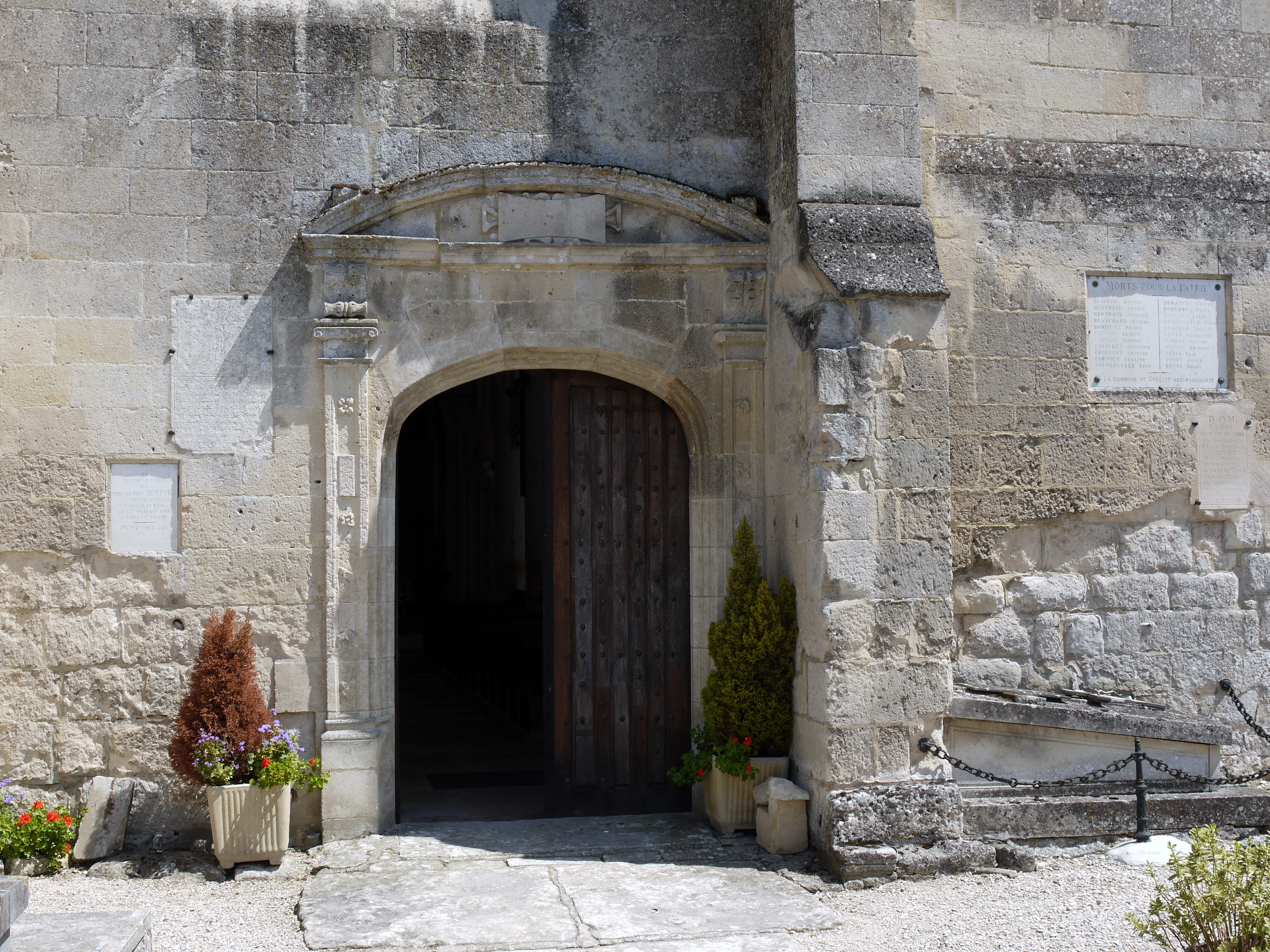 Porche de l'église de Chelles, Oise, France